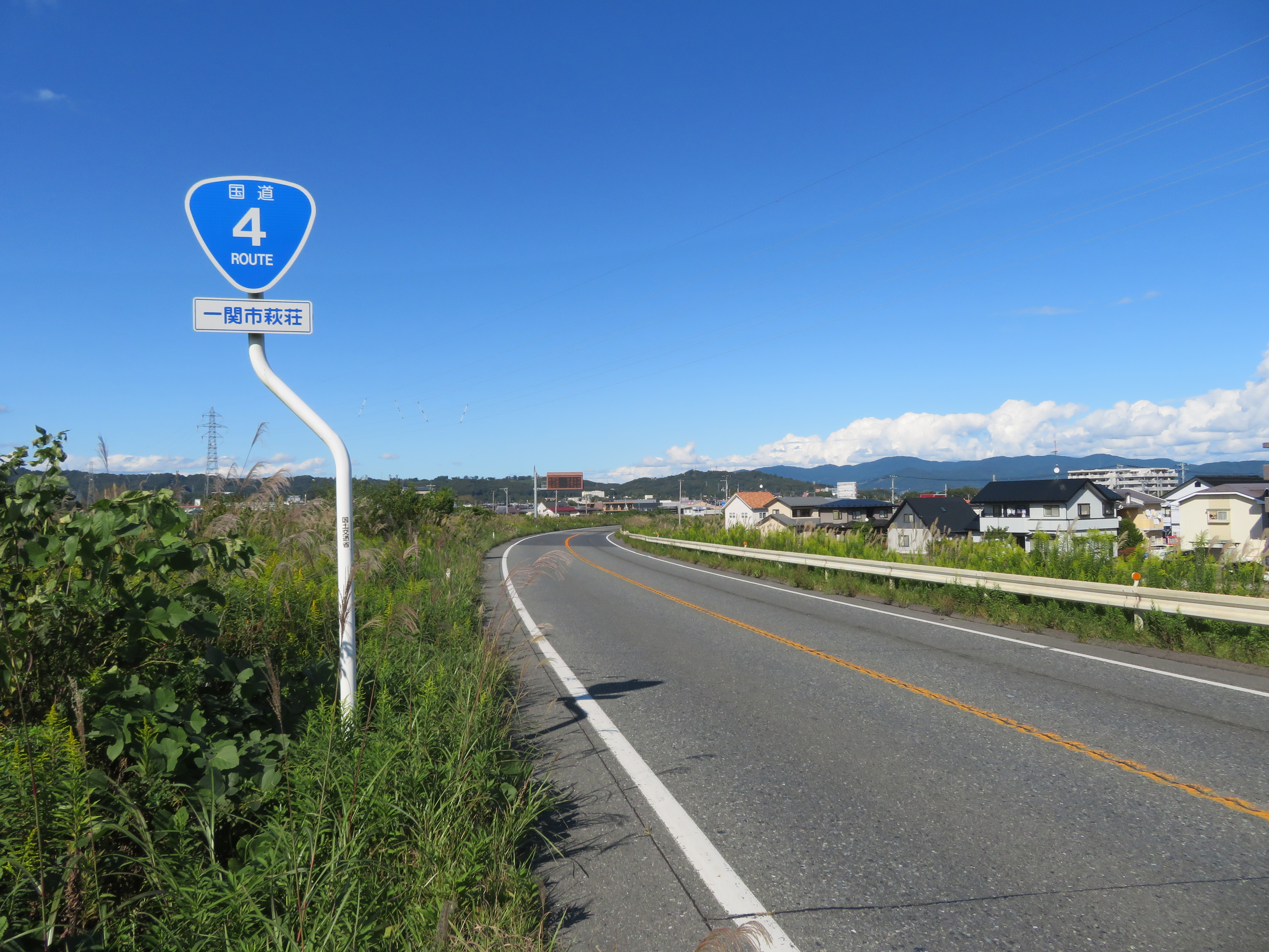 国道4号一関バイパス 岩手県一関市萩荘付近（平泉方面を撮影）